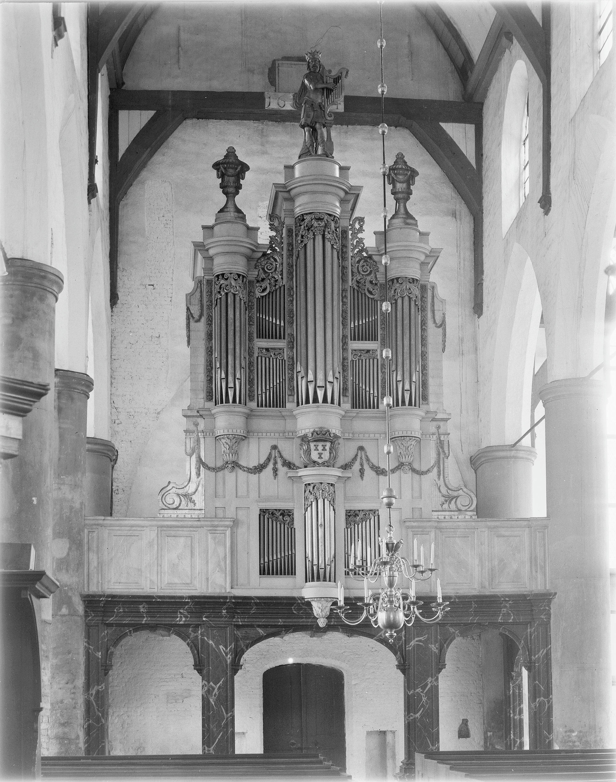 N.H.Kerk en Toren: orgel